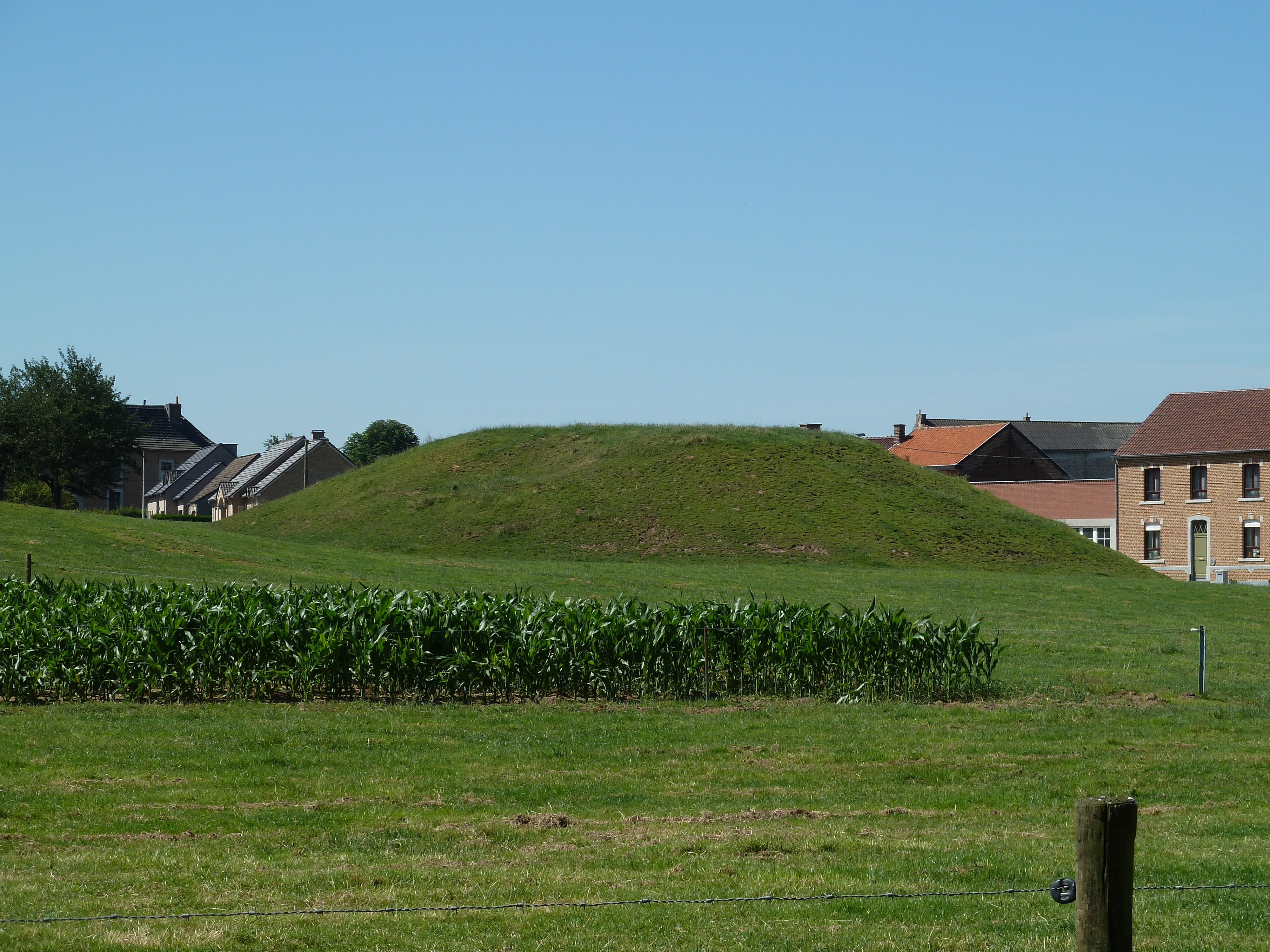 Motte, Horpmaal, Heers, Belgique